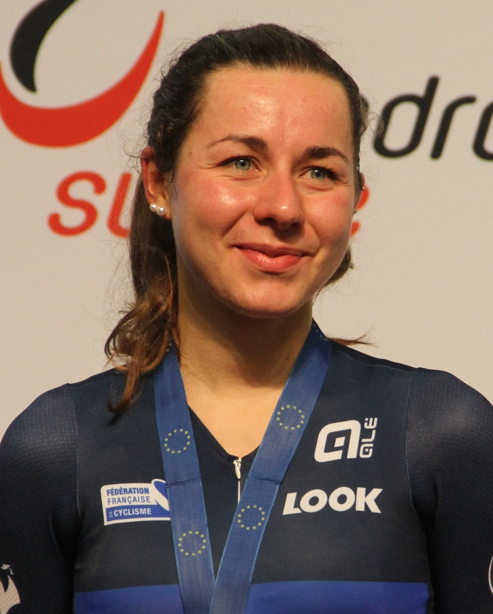 Élise Delzenne, franz. Radsportlerin The making of this document was supported by the Community-Budget of Wikimedia Germany.